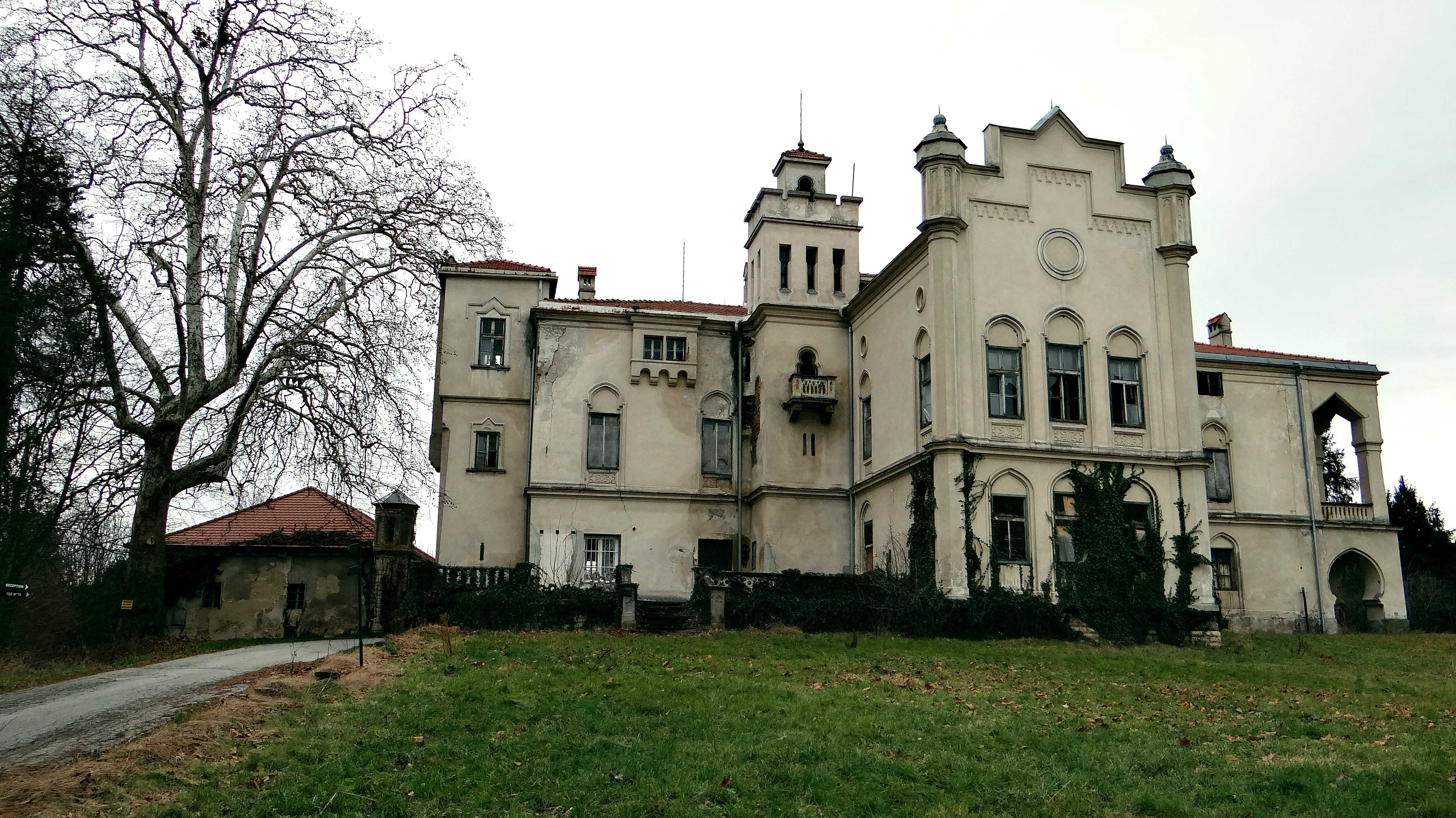 Dvorec Jelše 2014